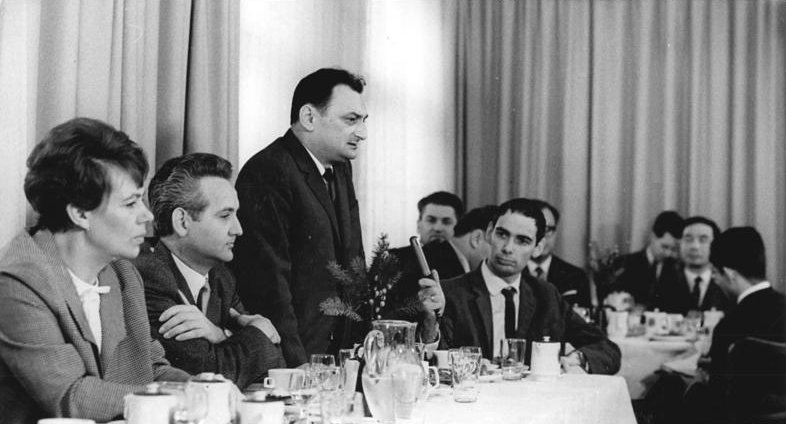 Zentralbild Franke 4.12.1967 Berlin: Pressekonferenz zu neuem Vietnam-Roman Leitende Mitarbeiter des Verlages "Das Neue Berlin" stellten Vertretern der Presse am 4.12.67 auf einer Konferenz im Berliner Club der Filmschaffenden "Möwe" einen neuen Roman Harry Thürks vor,der dem Befreiungskampf des vietnamesischen Volkes gegen die USA-Agressoren gewidmet ist. Der Roman mit dem Titel "Der Tod und der Regen", das erste Werk eines DDR-autoren zu diesem Thema, wird noch bis Jahresende erscheinen. Auf unserem Foto v.l.n.r. die Leiterin des Verlages, Käthe Krieg, Cheflektor Dr. Gerhard Branstner und Harry Thürk (stehend), der Erläuterungen zu seinem Buch gibt.